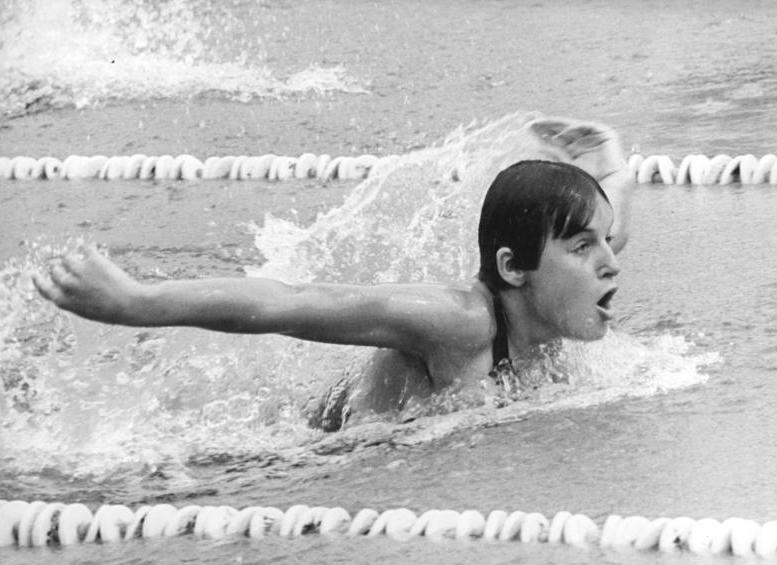 Sabine Steinbach Zentralbild Kluge 27.4.69-Rostock: DDR-Hallenmeisterschaften im Schwimmen- Sabine Steinbach (SC Karl-Marx-Stadt) holte sich am 26.4.69 den Meistertitel über 400 m Lagen (Zeit: 5:16,5 min).